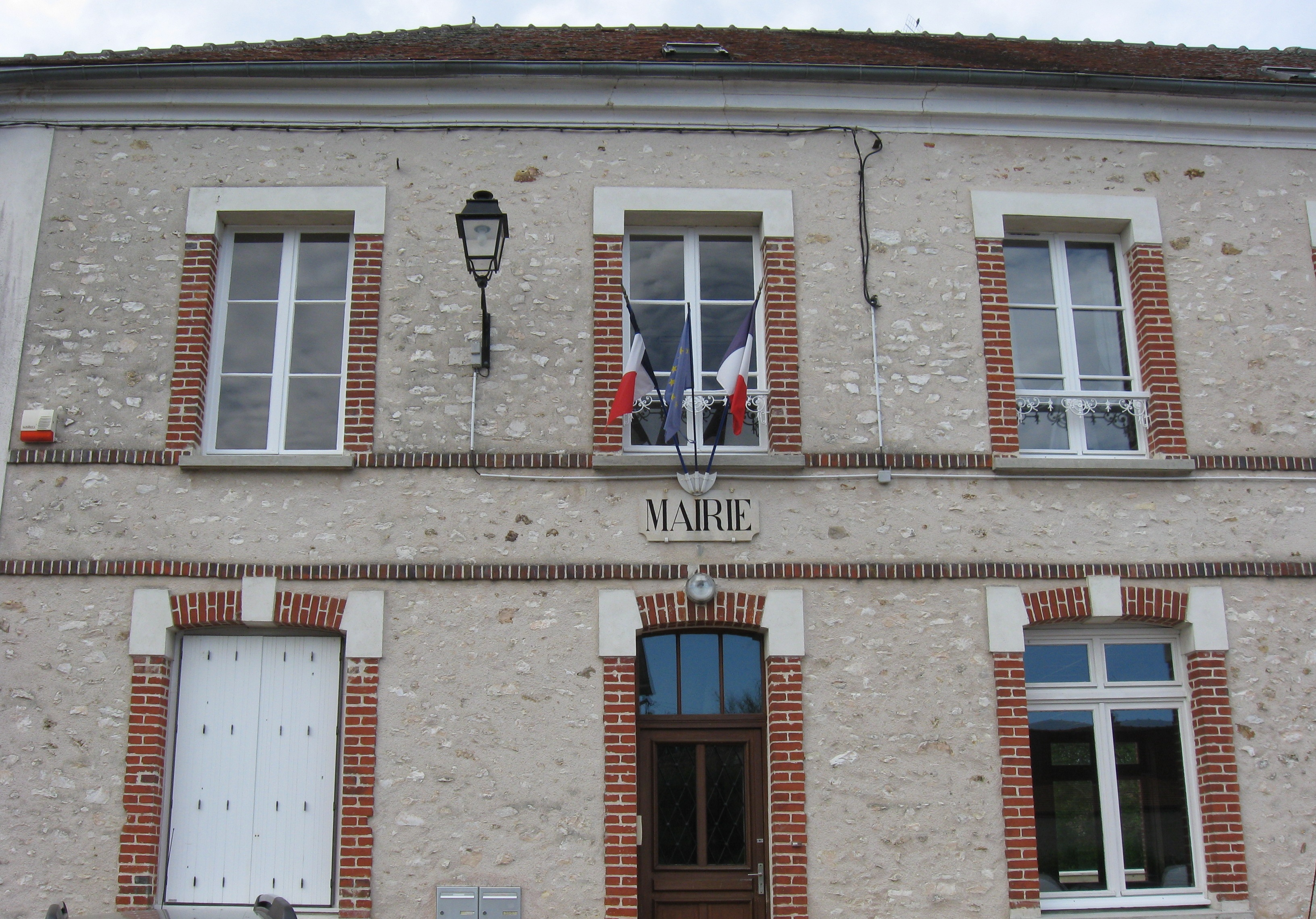 Mairie de Courtacon. (Seine-et-Marne, région Île-de-France).